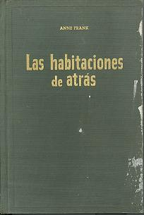 En 1955 aparece la primera edición del diario de Anne Frank en español con el títuo "Las habitaciones de atrás"